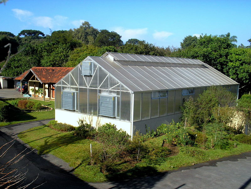 Nova estufa, para reprodução de plantas brasileiras ameaçadas de extinção, no Jardim Botânico de Curitiba, PR, sul do Brasil.